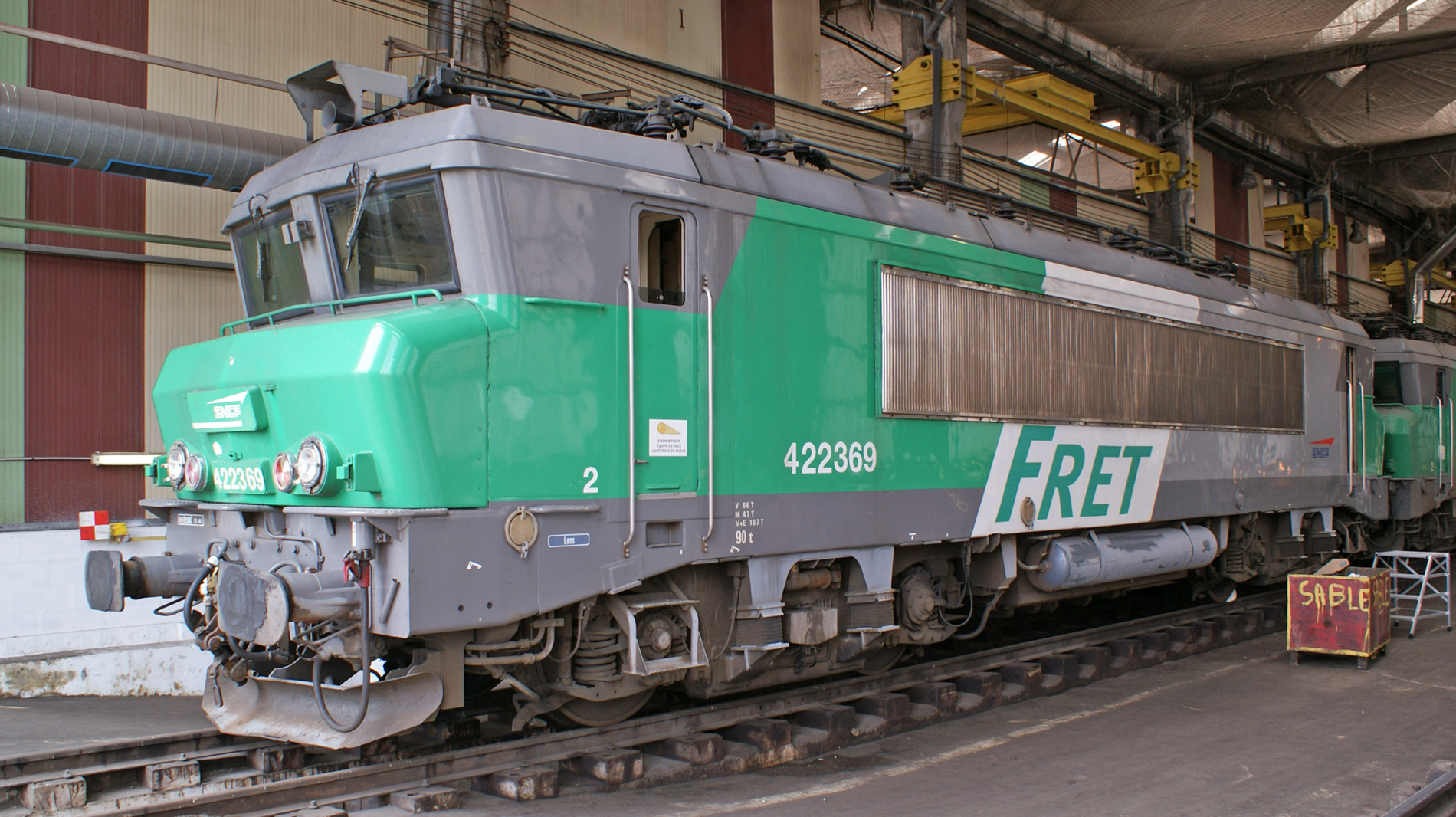 BB 22369 à Méricourt (dépot Lens)